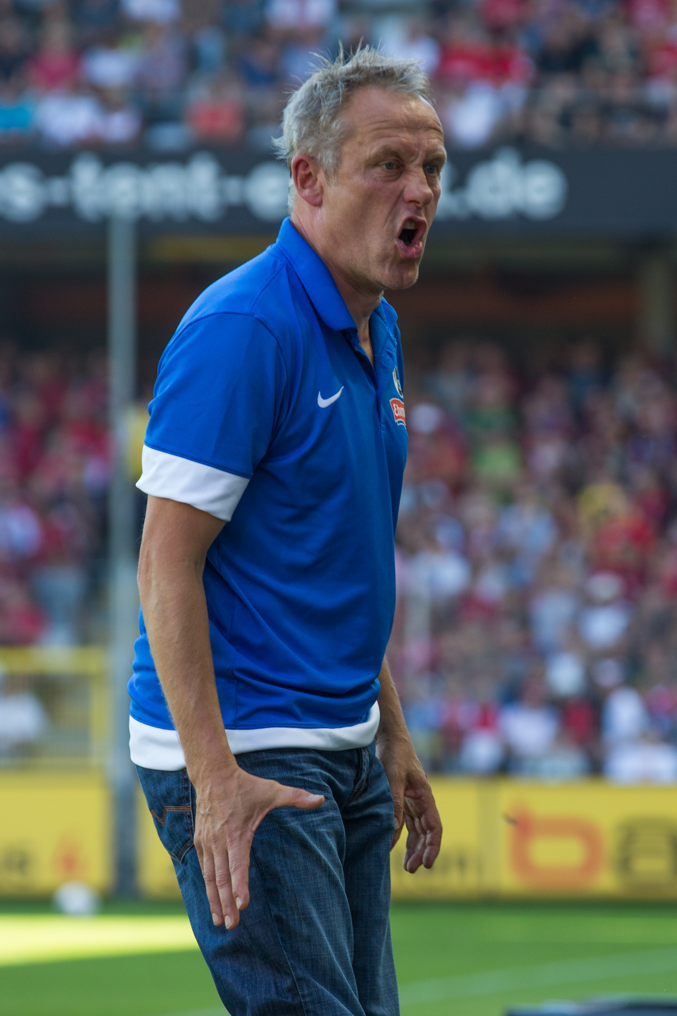 SC Freiburg vs FSVMainz 17 août 2013